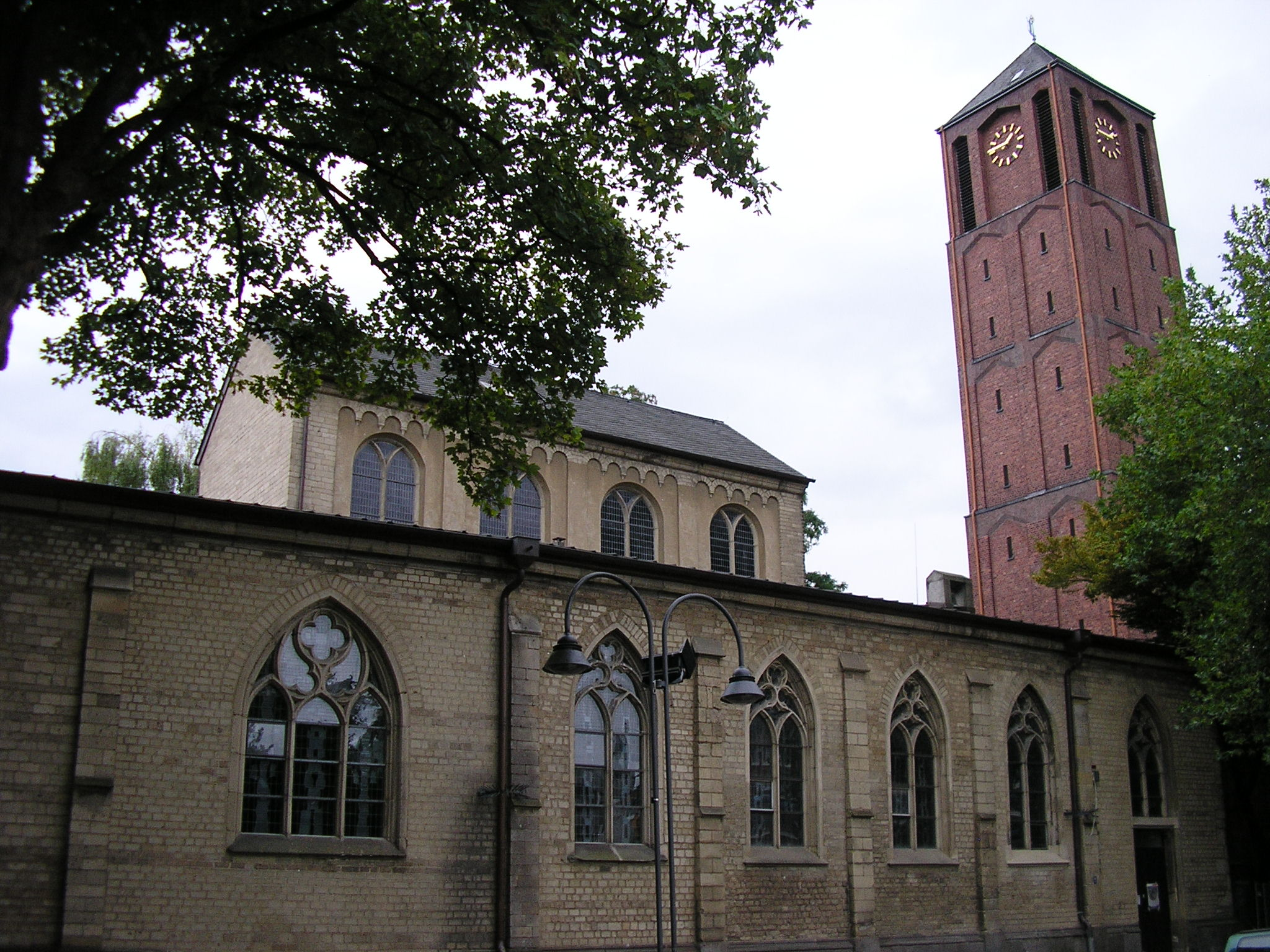 St. Johann-Baptist-Kirche zu Köln